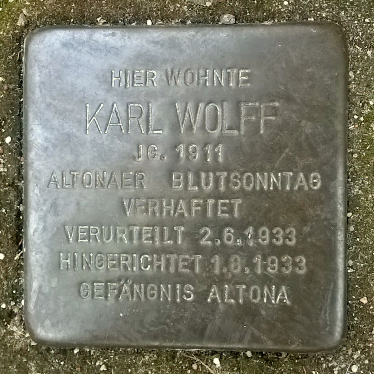 Stolperstein für Karl Wolff, Süderstraße 323 in Hamburg-Hamm